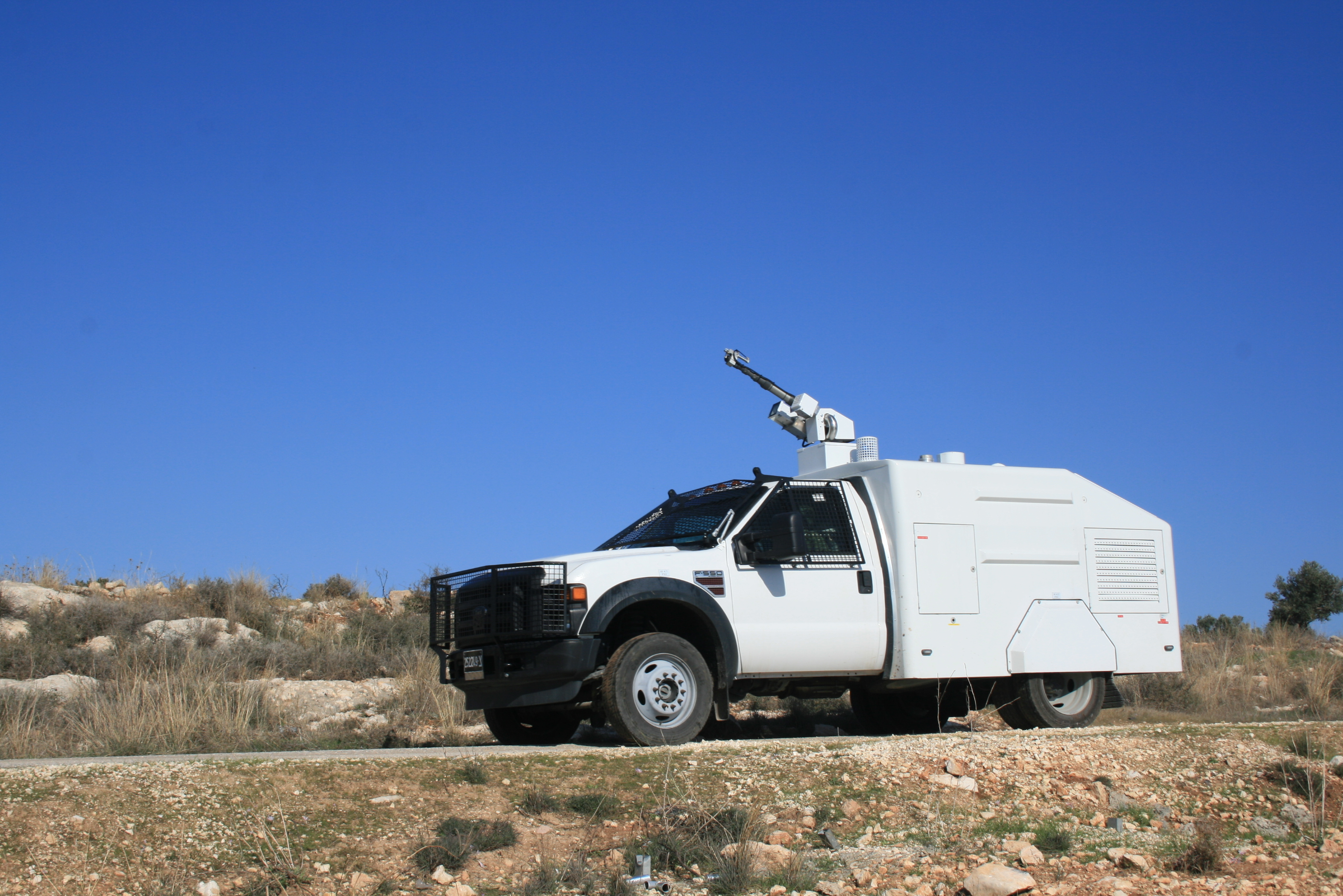 מכלית בואש (אמצעי לפיזור הפגנות) בהפגנה בבלעין דצמבר 2011UnknownUnknown skunk (weapon) in bil'in, december 2011